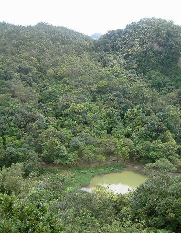 台北縣汐止市（今新北市汐止區）翠湖。從大坪尖山（內溝山）鳥瞰翠湖（2005年夏天）。